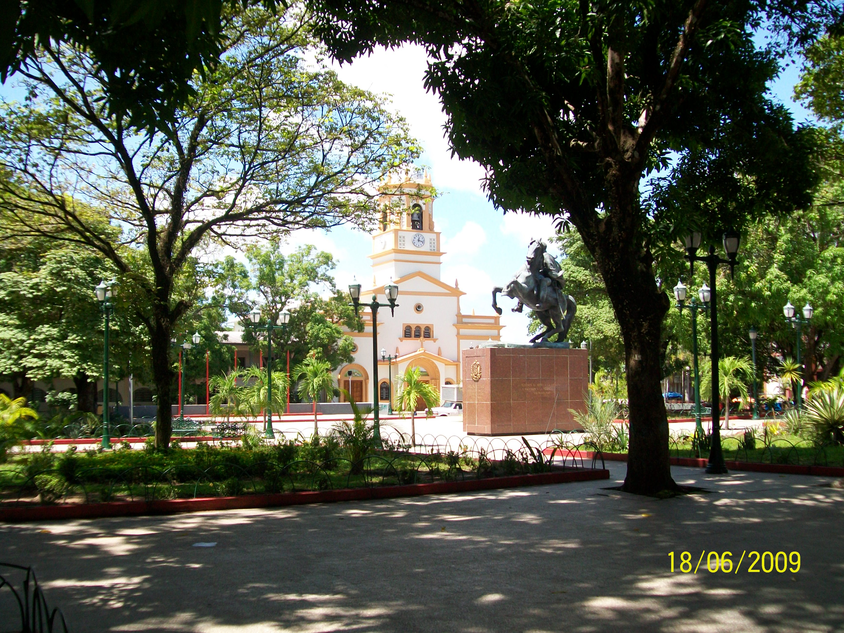 plaza ubicada en el centro de puerto ayacucho forma parte de lared de palzas bolivar a nivel nacional ,tenia que hacerse obligatoriamente,mientras que la catedral maria auxiliadora fue construida por los primeros catolicos que llegaron entre 1954 a 1940 esta area esta administrada por el consejo episcopal de pto.ayacucho